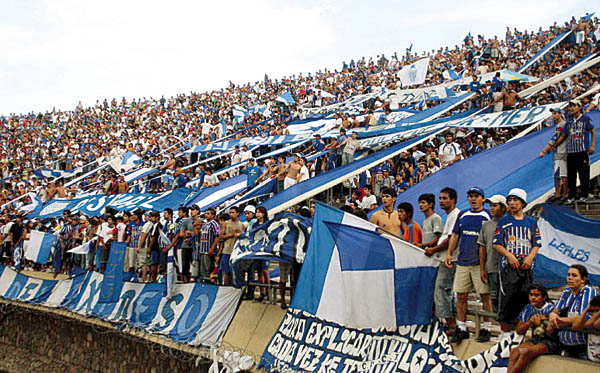 Hinchada de Godoy Cruz de Mendoza en 2008.